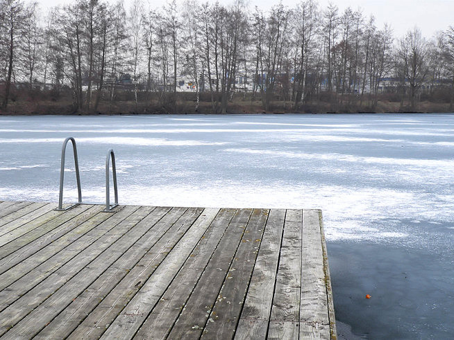 Kirchhorster See im Winter